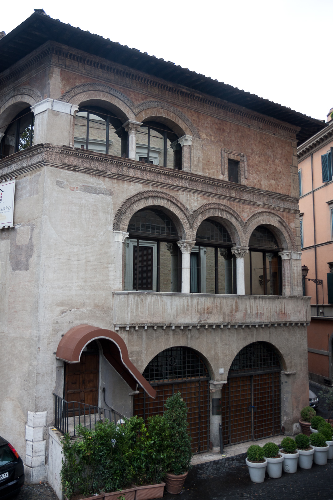 Rione V Ponte, 00186 Roma, Italy